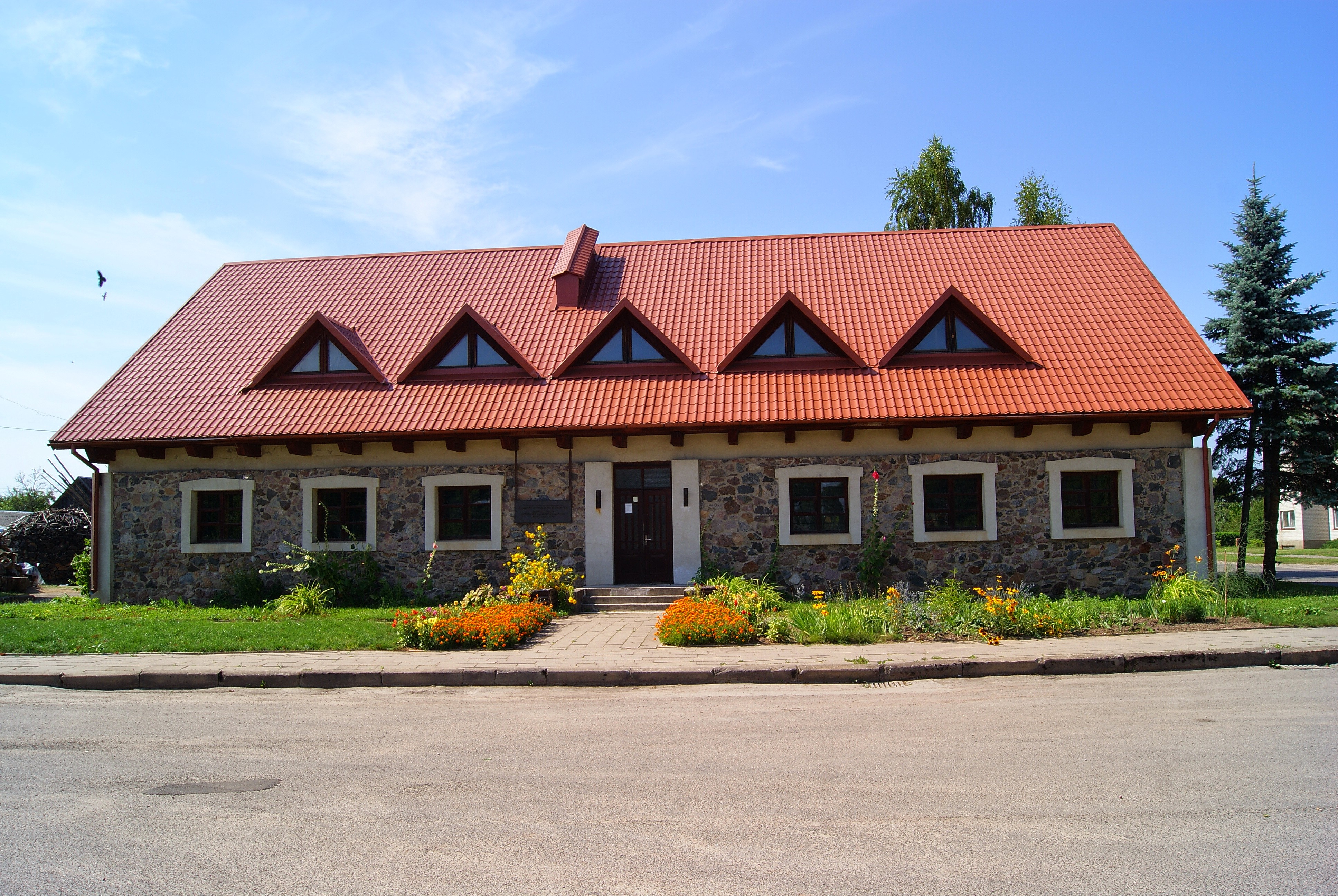 Kriaunos museum